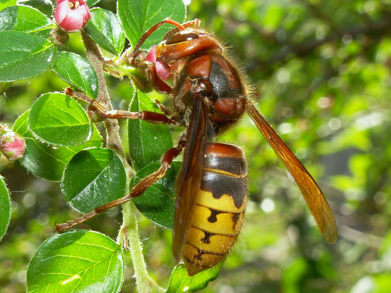 Vespa crabro germana, Queen Hornet on a Cotoneaster; Hornissenkoenigin auf Zwergmispelstrauch; Diese Königin hat den Winter überstanden und nutzt die Zwergmispelblüte als Nektarquelle zur Nahrung. Aufgenommen ca. 50 km südlich von Frankfurt am Main. Weitere Informationen unter und